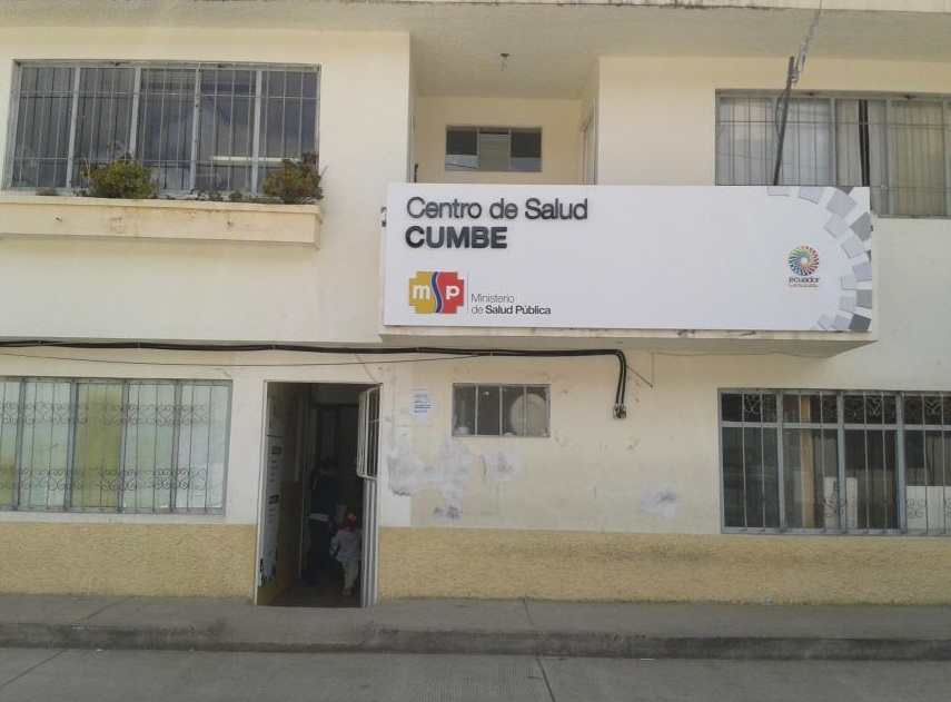 Subcentro de salud administrado por el Ministerio de Salud de Ecuador ubicado en Cumbe